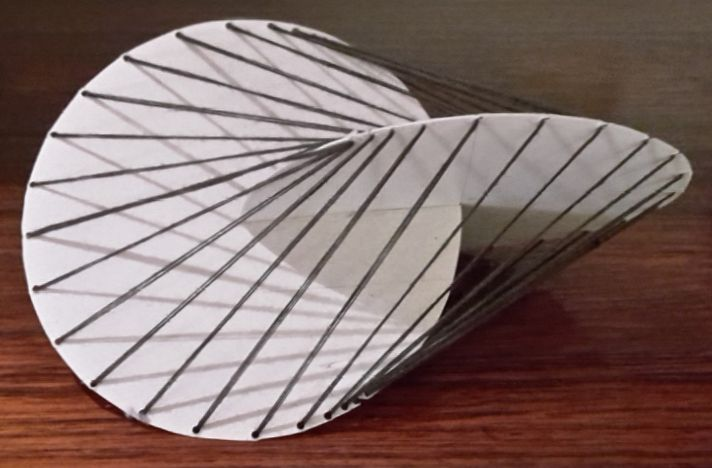 Oloid (2 Kreisscheiben aus Pappe und Bindfaden-Geradenschar der Regelfläche)